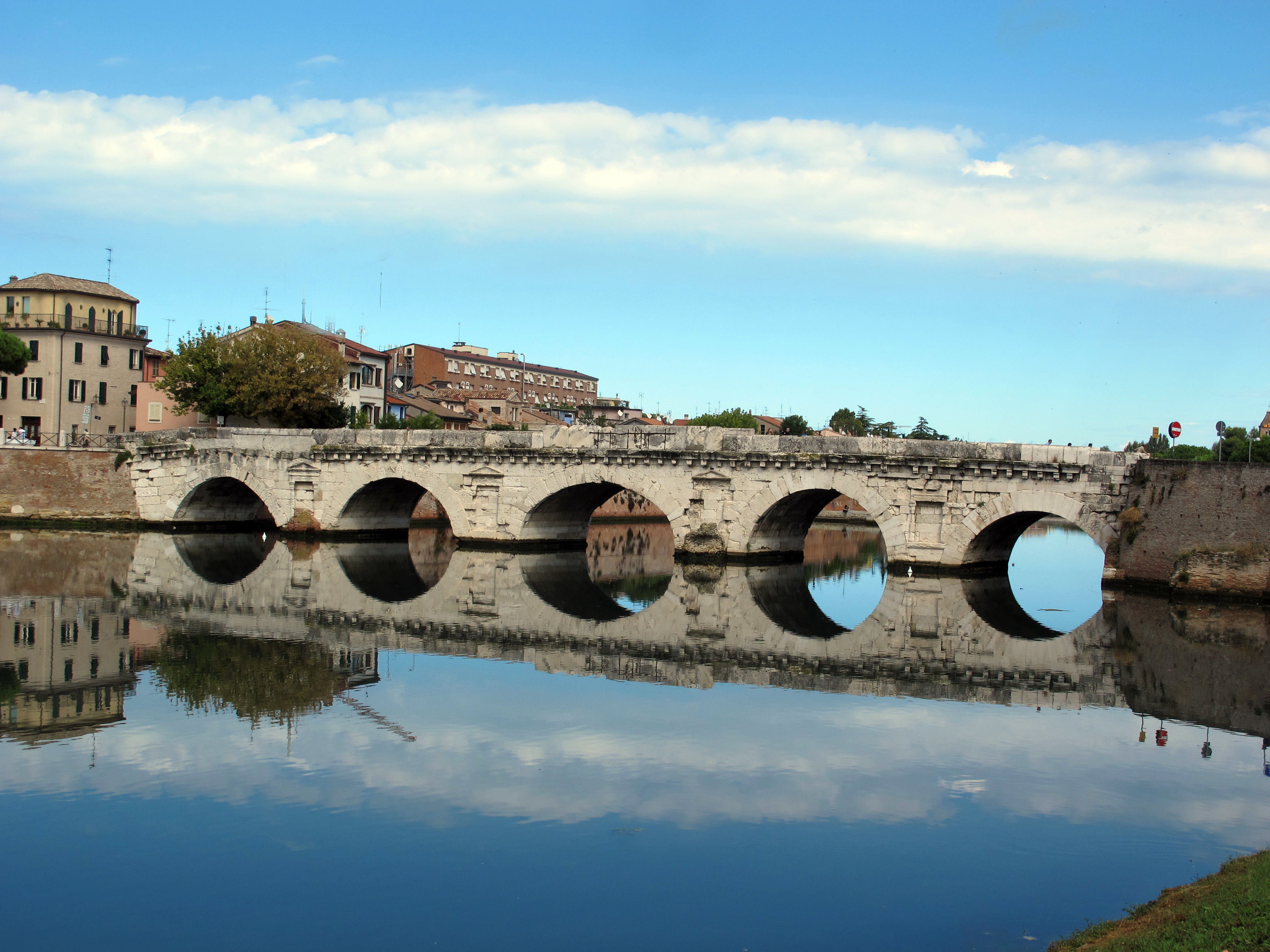 Ponte di Tiberio - MIBAC This is a photo of a monument which is part of cultural heritage of Italy.